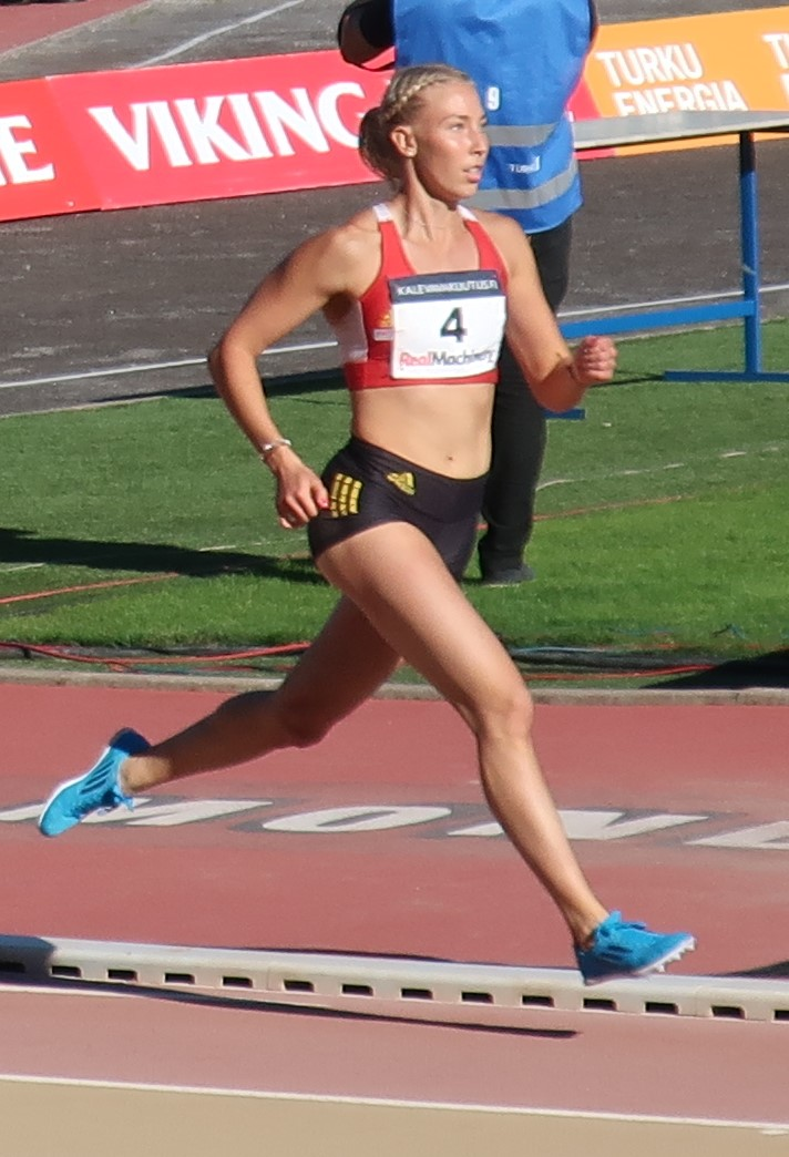 Jessica Rautelin seitsenottelun 800 metrin juoksussa Kalevan kisoissa 2020.